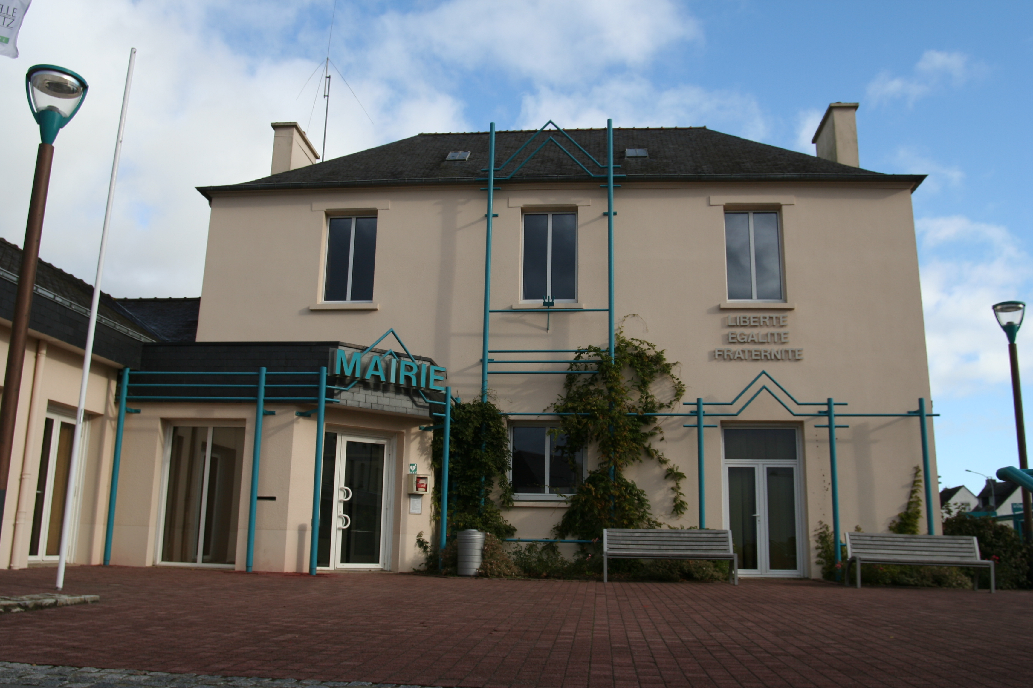 Mairie de La Chapelle-des-Fougeretz.